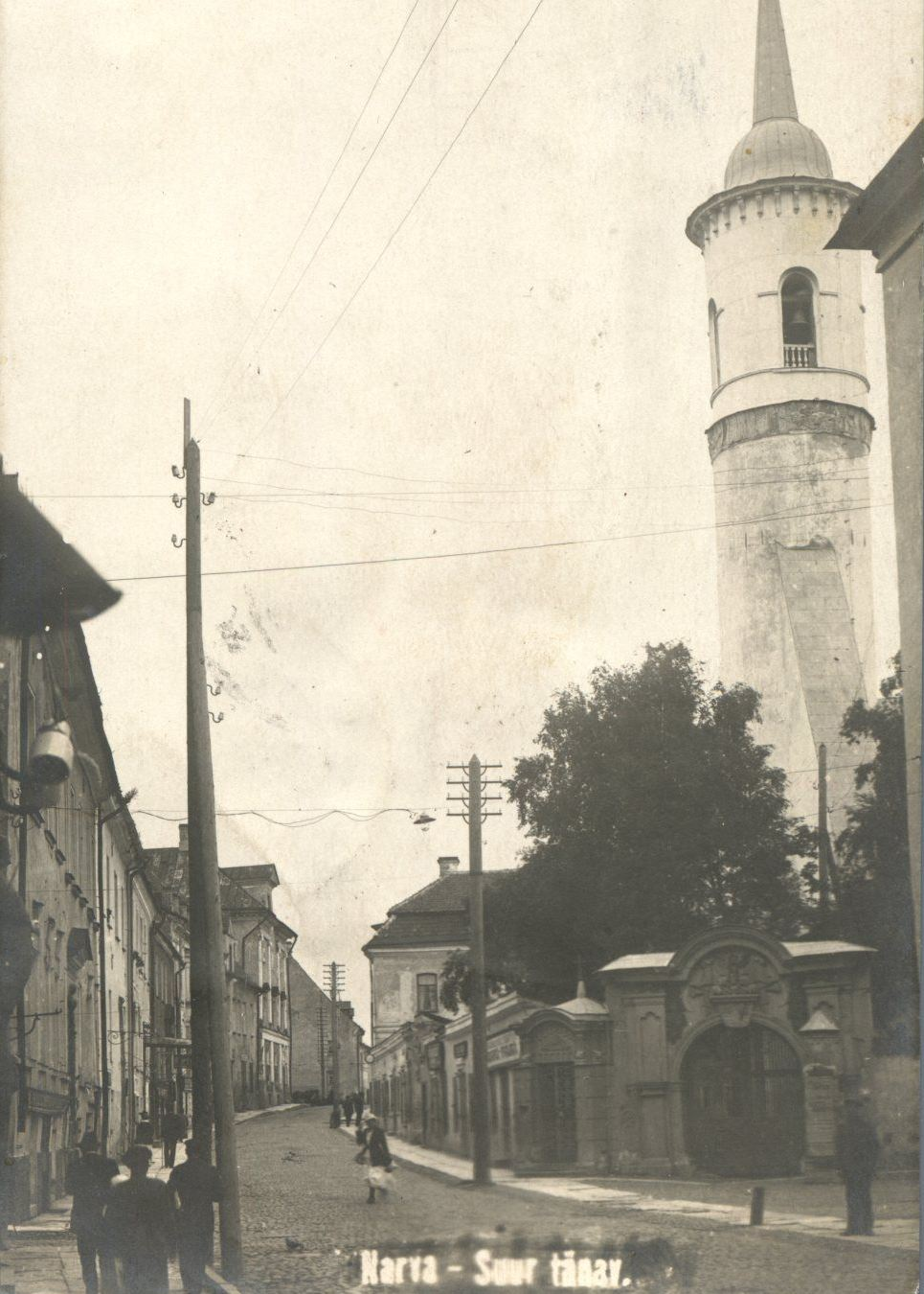 Narva. Suur tänav. Narva Issandamuutmise katedraal